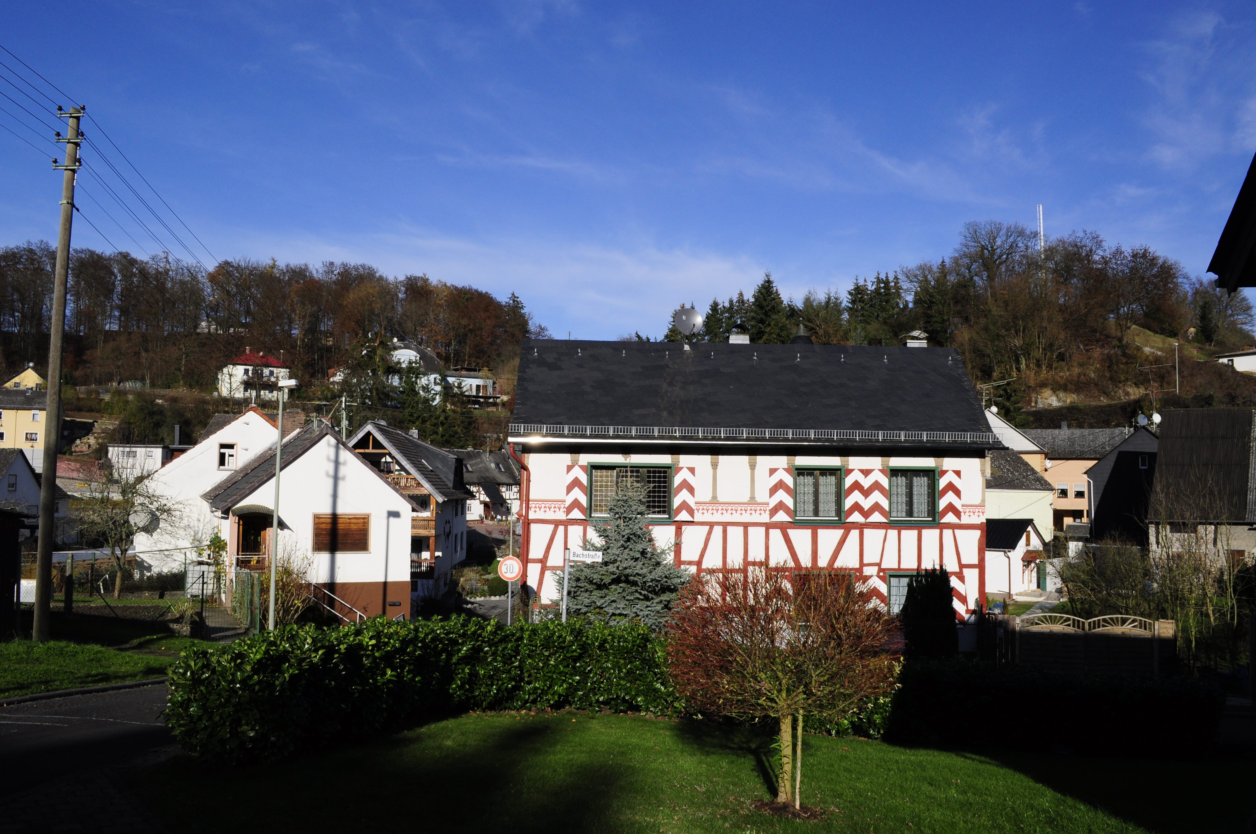 Fachwerkhaus,56370 Wasenbach,Mühlweg 4